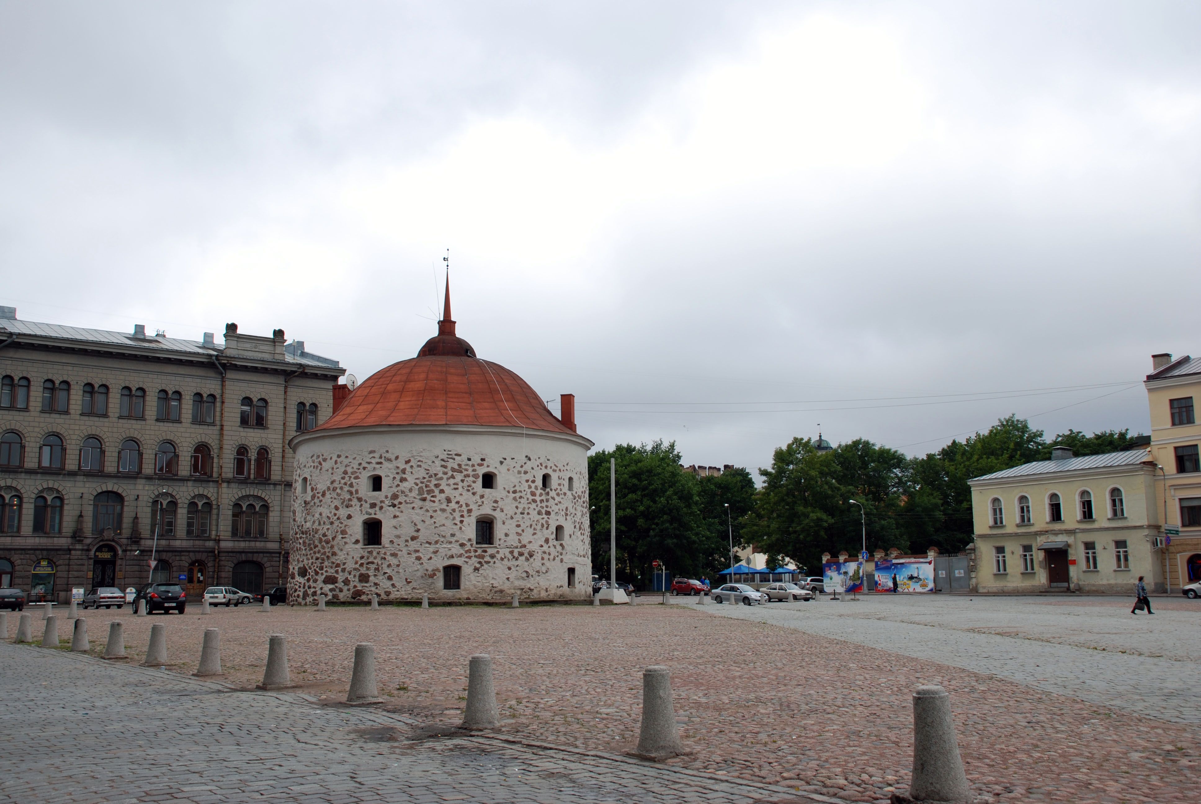 Круглая башня (Санкт-Петербург и Лен.область, Выборг, Рыночная площадь)